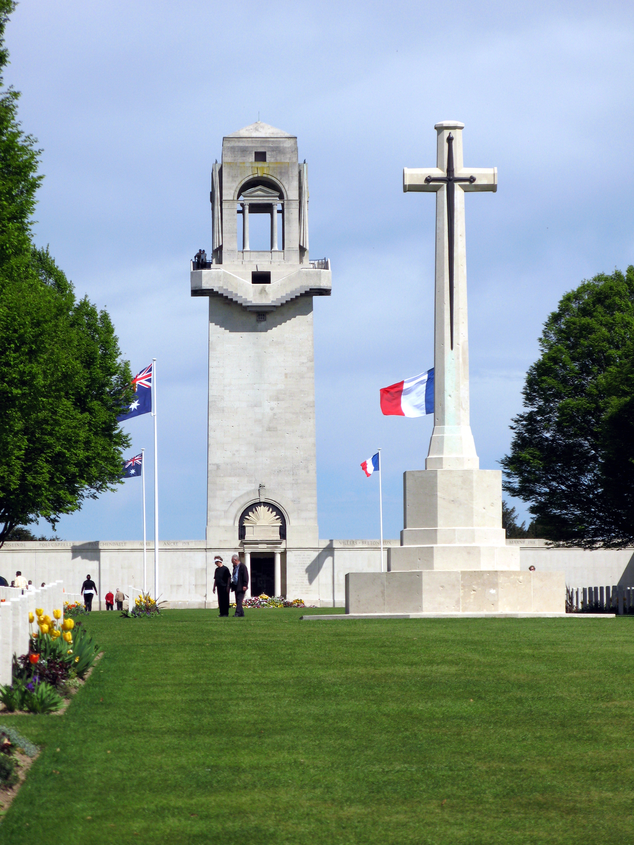 Villers-Bretonneux (Somme, France) - La croix du cimetière militaire et la tour du Mémorial National Australien.